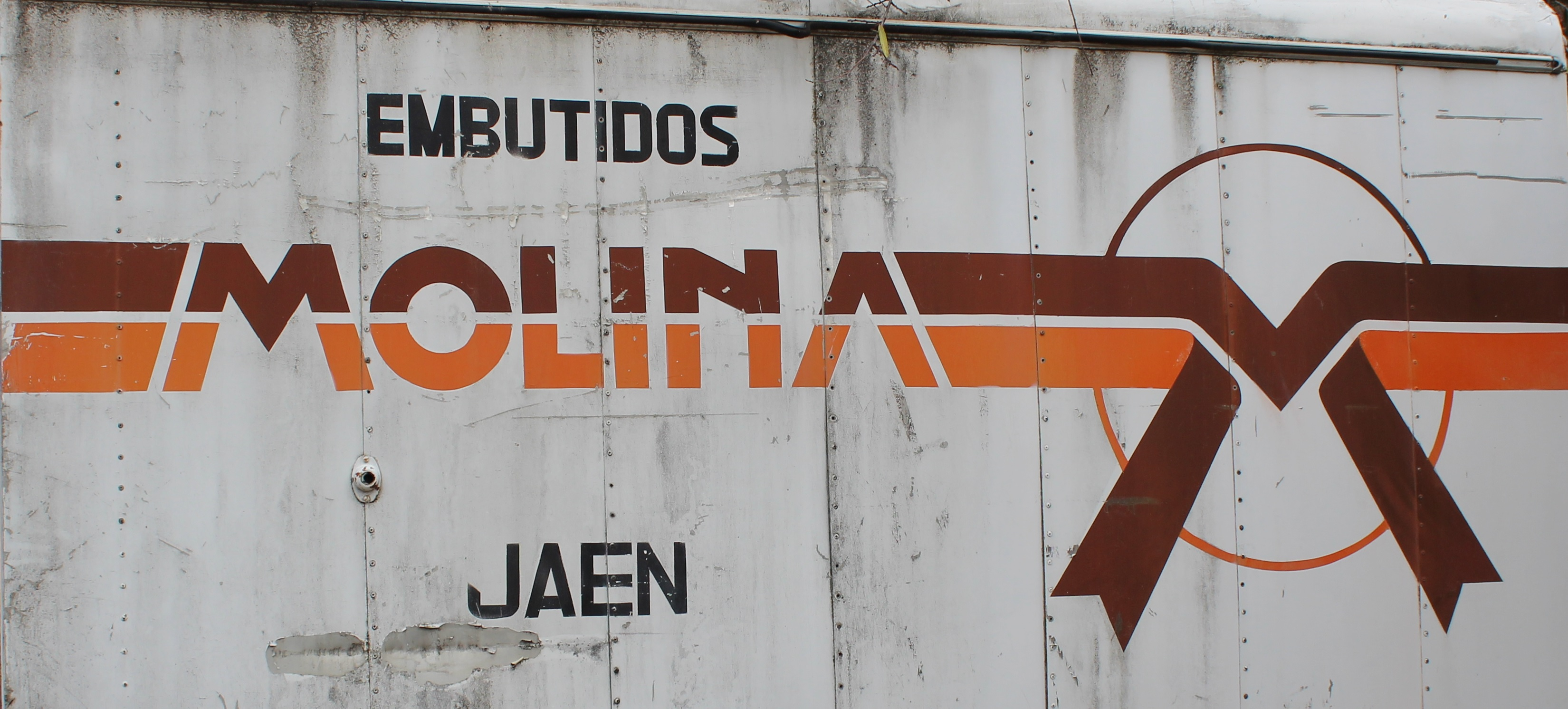 Detalle del logotipo de Cárnicas Molina